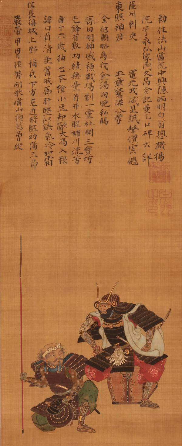 下方貞清像